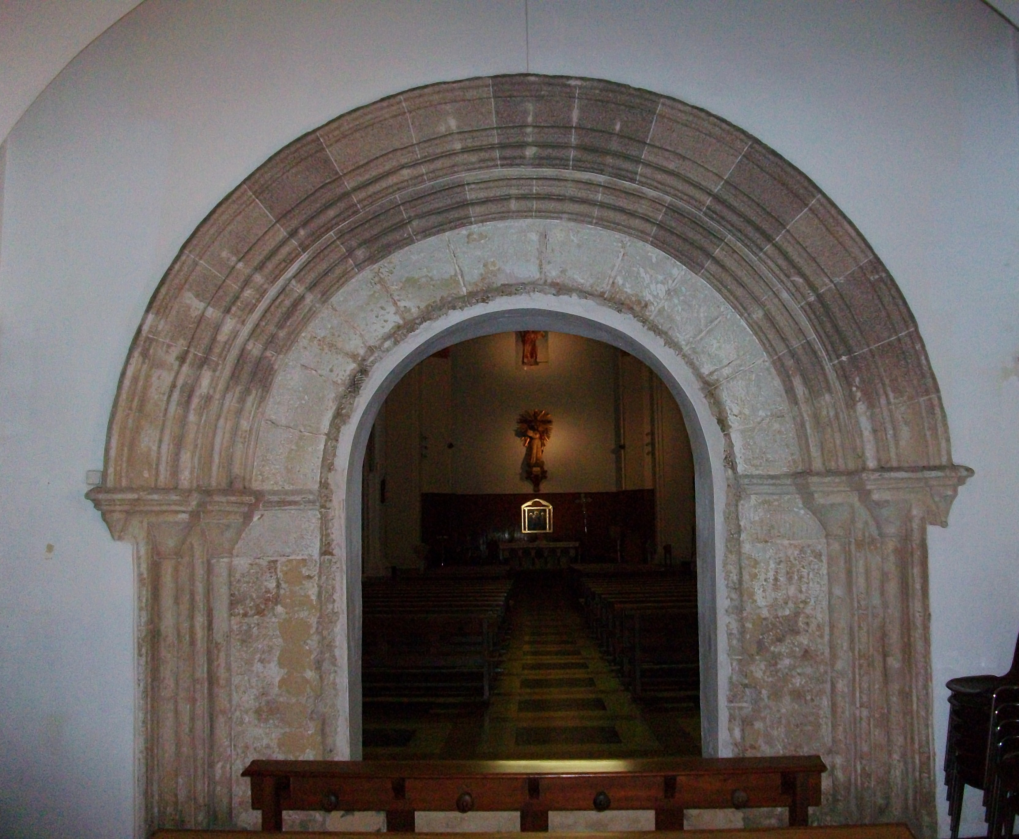 Portada tardorromànica als peus de l'església de sant Vicent de la Roqueta.